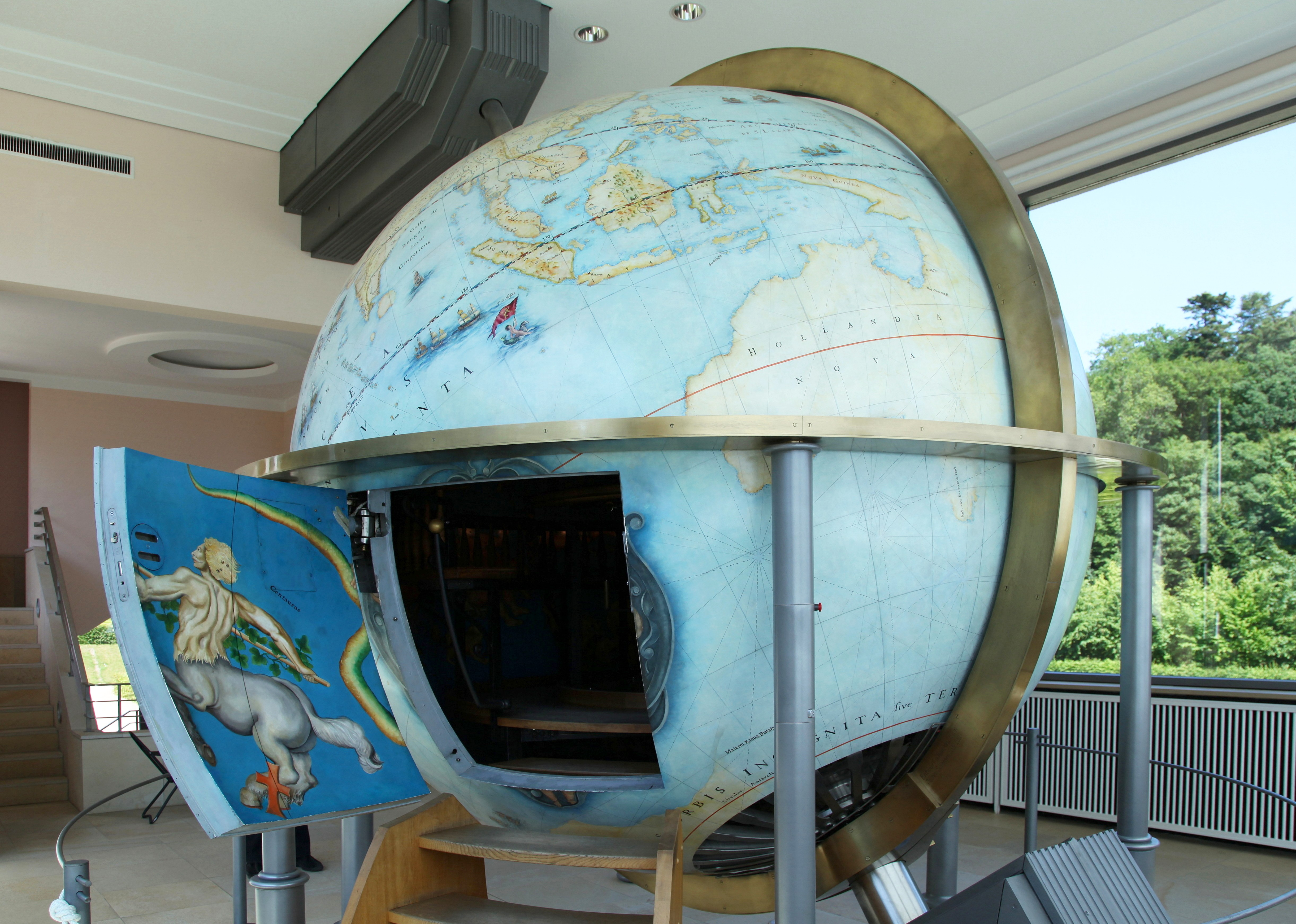 Rekonstruierter Globus, Globushaus im Terrassengarten im Neuwerkgarten, Königsallee in Schleswig